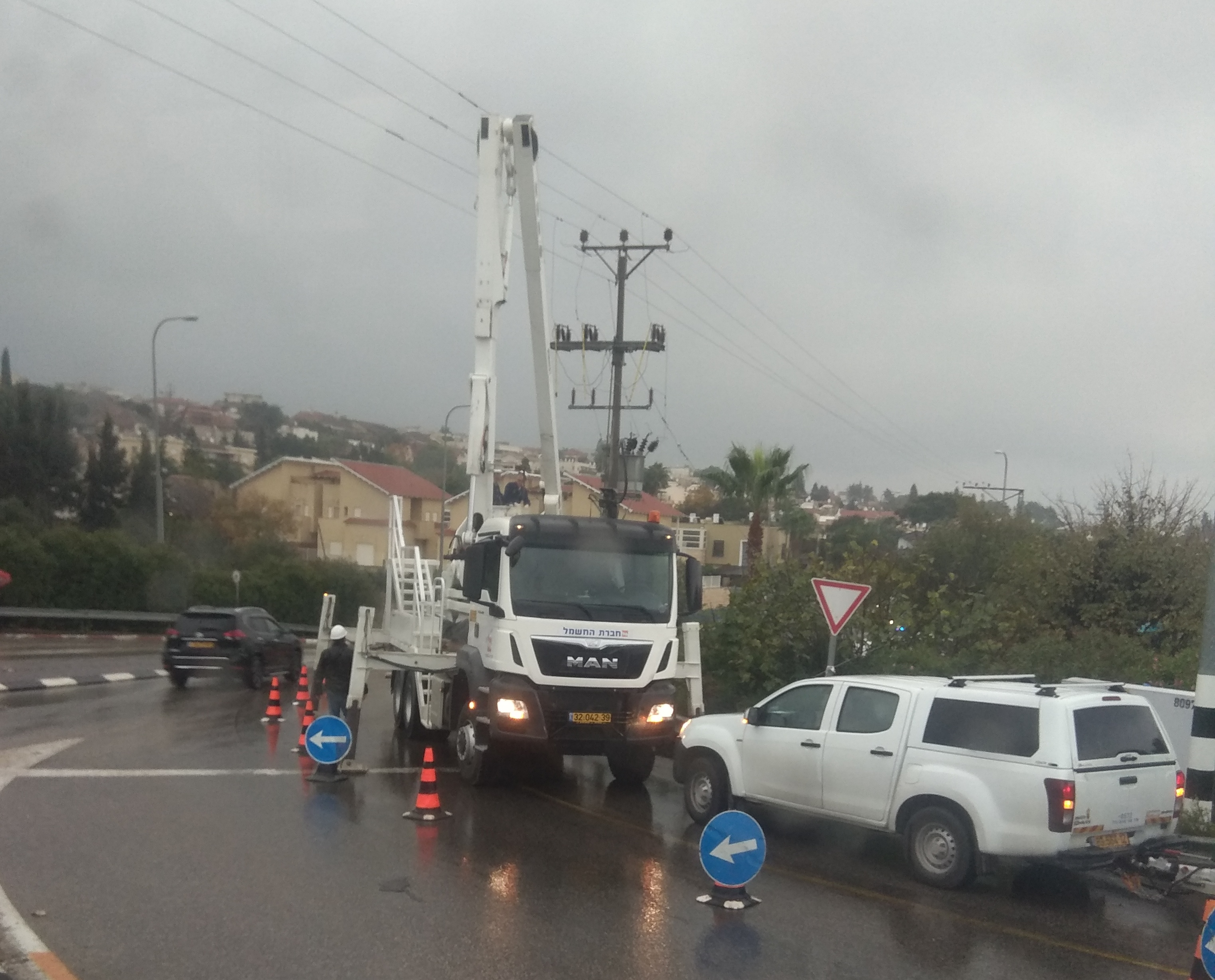 עובדי החברה בעבודת שטח בכניסה לרמת ישי